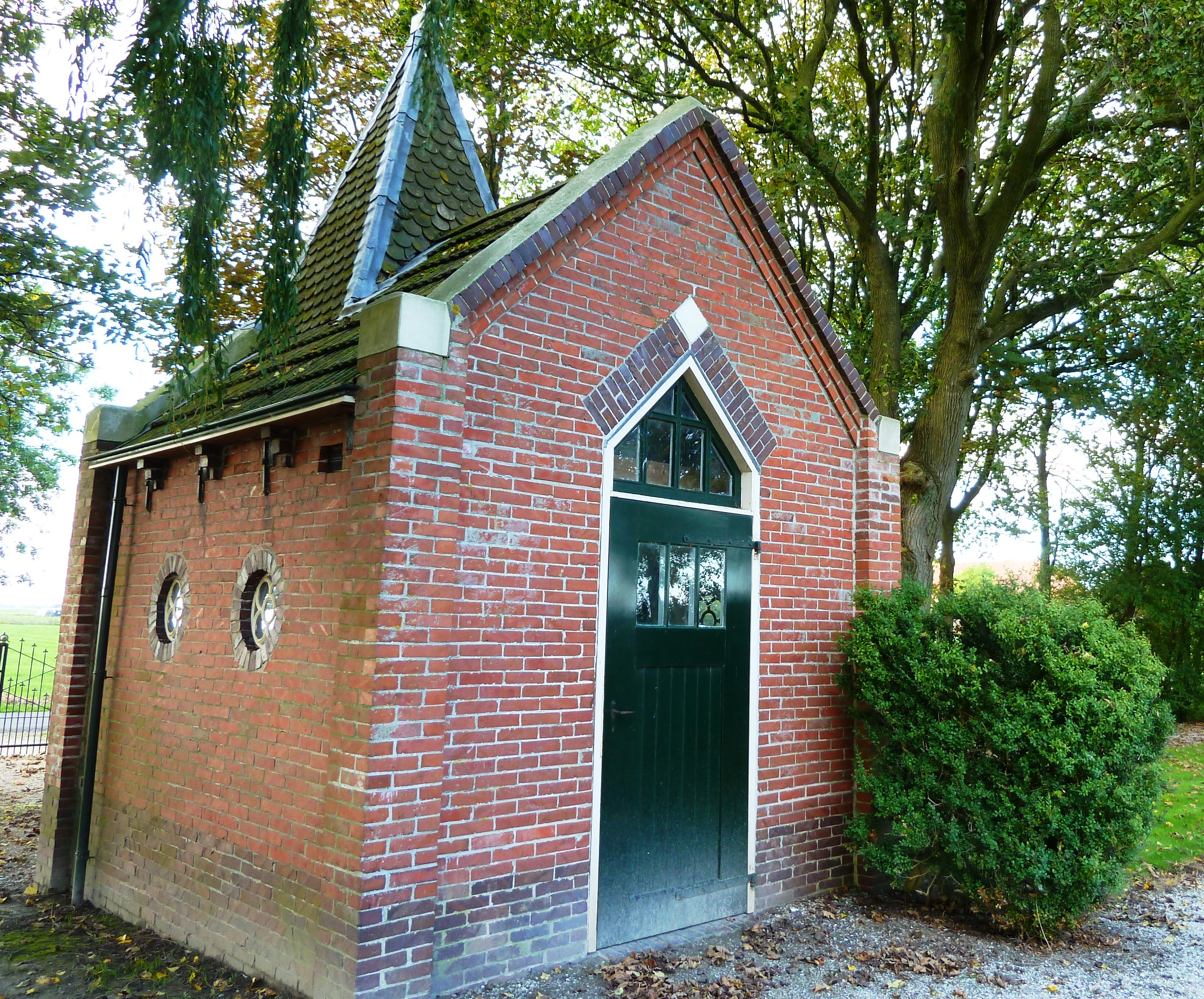 Baarhuisje op de begraafplaats van Huizinge (Groningen, Nederland).